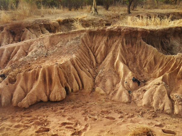 Cette photo souligne l'impact de l'érosion sur les sols à Péyiri, Burkina Faso